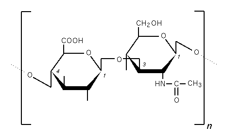 Acide hyaluronique. Avril 2005 Création personnelle.